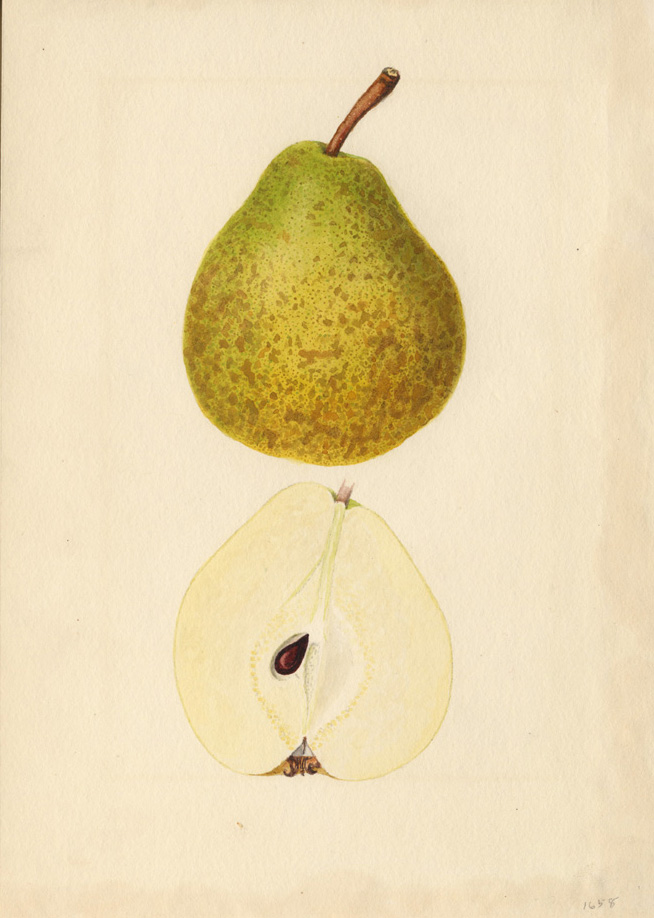 Nelis d'hiver